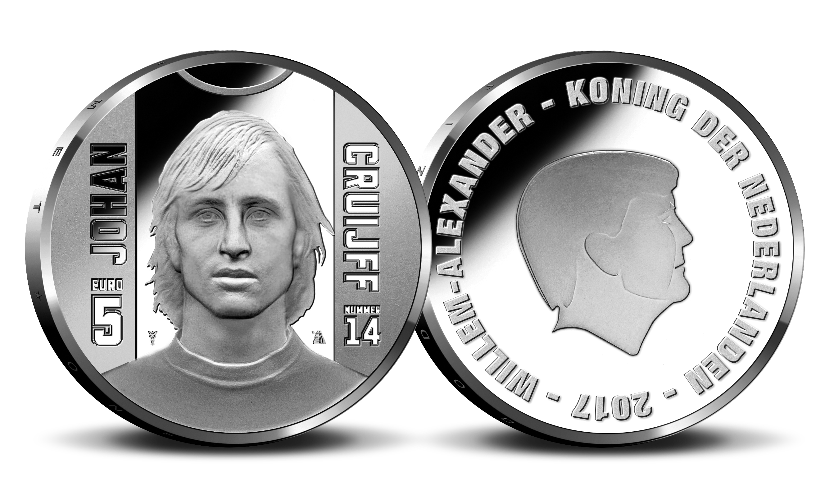 Ontwerp van herdenkingsmunt 'het Johan Cruijff Vijfje', een officieel wettig betaalmiddel van vijf euro in Nederland.